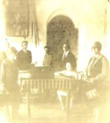 Celina Guimarães, primeira mulher a votar em Mossoró (RN), no local onde atualmente funciona a Biblioteca Municipal.